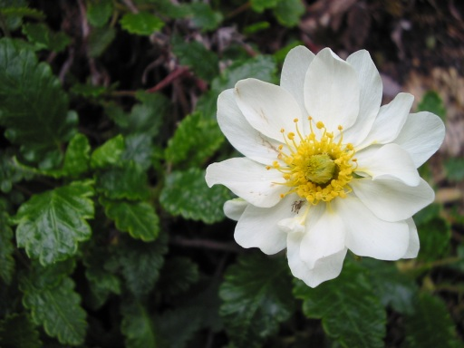 Dryas octopetala, , Jardin alpin, Jardin des Plantes de Paris